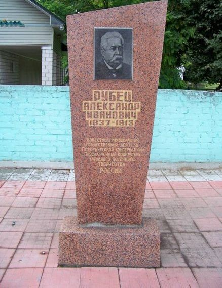 Memorial Rubca